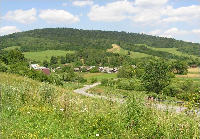 Celkový pohľad